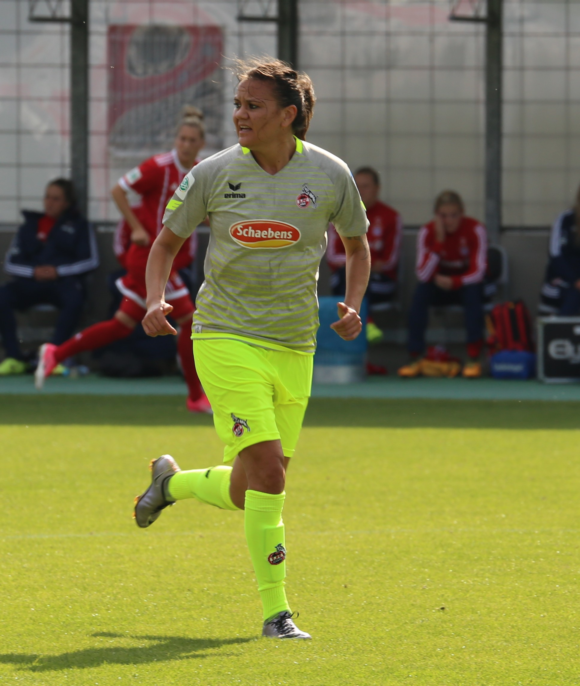 Amber Hearn, 1. FC Köln, beim Frauen-Bundesliga-Spiel FC Bayern München gegen 1. FC Köln am 24. September 2017 im Stadion an der Grünwalder Straße (Ergebnis war 2:0)